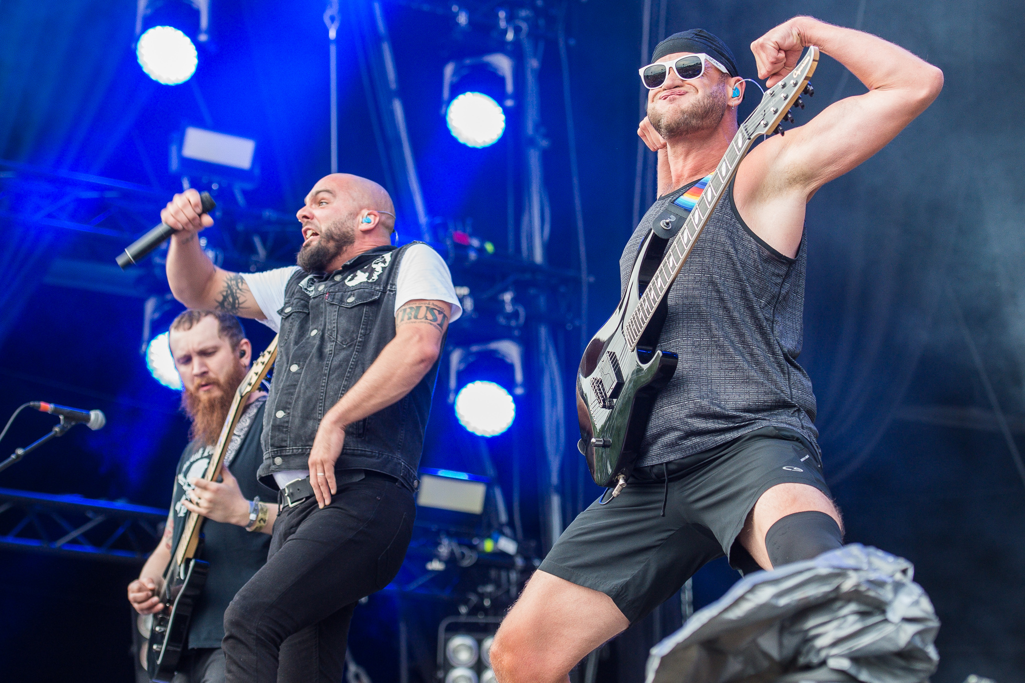 ARGO-Konzerte,Adam Dutkiewicz,Beck's Park Stage,Festival,Jesse Leach,Joel Stroetzel,Killswitch Engage,Konzert,Livekonzert,Livemusik,Musik,RiP,Rock im Park 2016